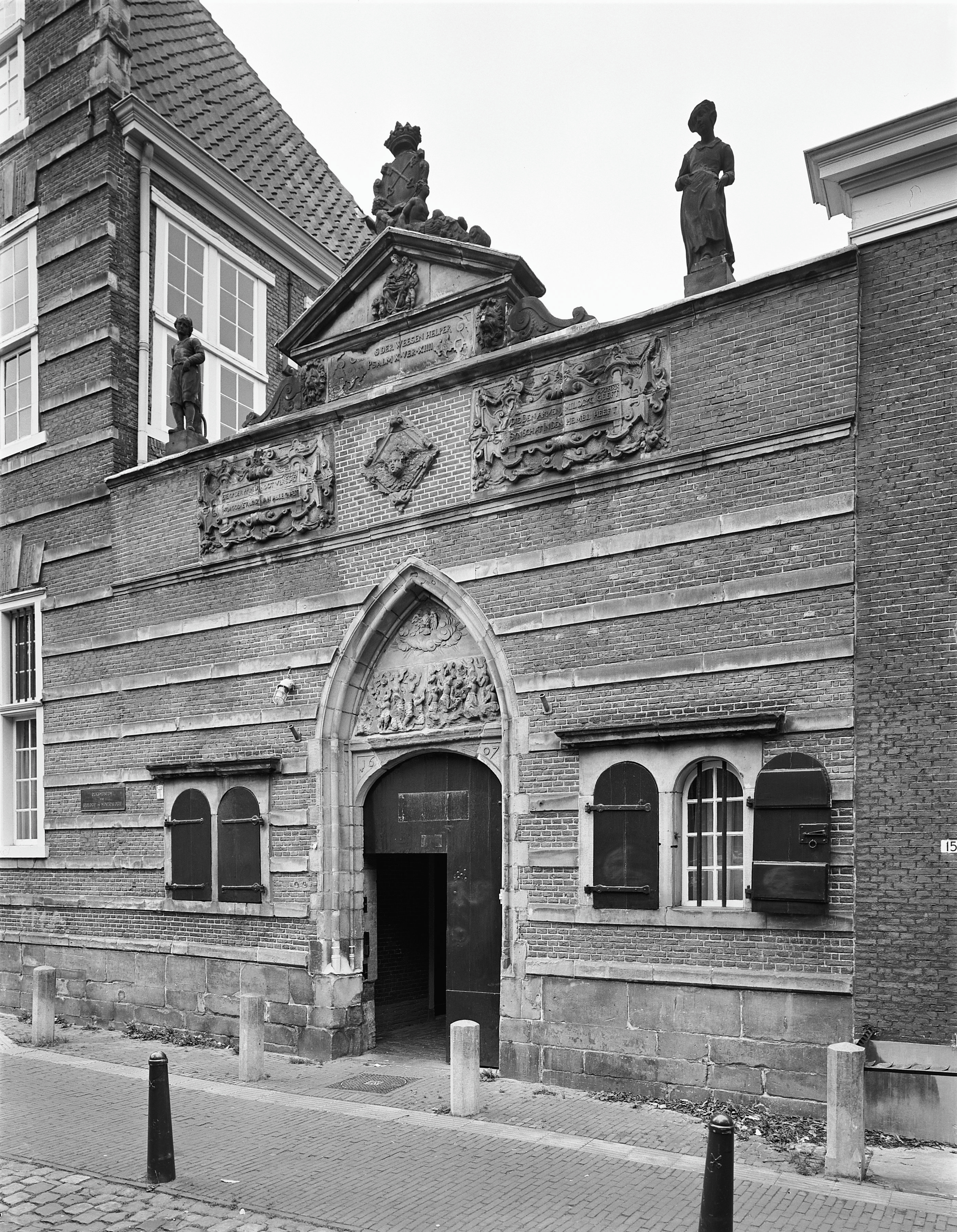 Weeshuis: Exterieur poortgevel, poort